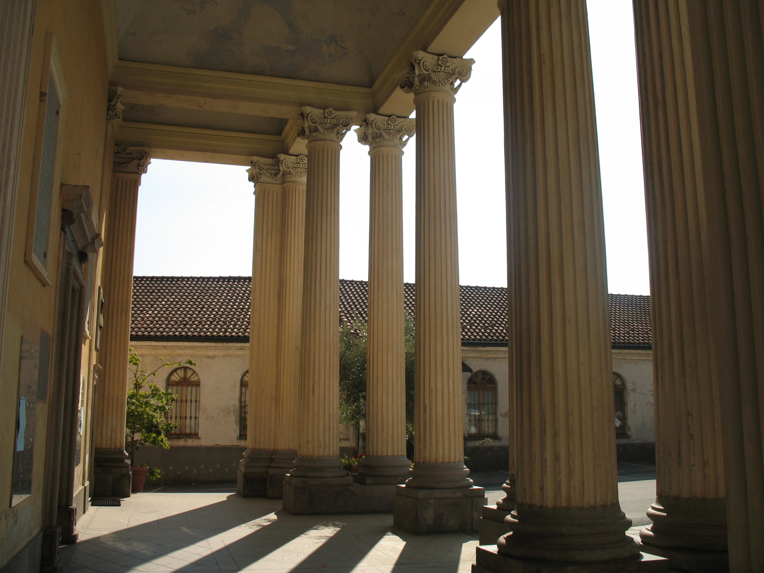 Immagine da Mosso (provincia di Biella, Piemonte, Italia) Particolare del pronao della chiesa di Santa Maria Assunta